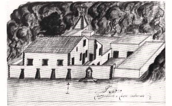 Οι κεντρικές αποθήκες των Ενετών στο Λασίθι, στην περιοχή του Μόρο, κοντά στον Άγιο Γεώργιο.